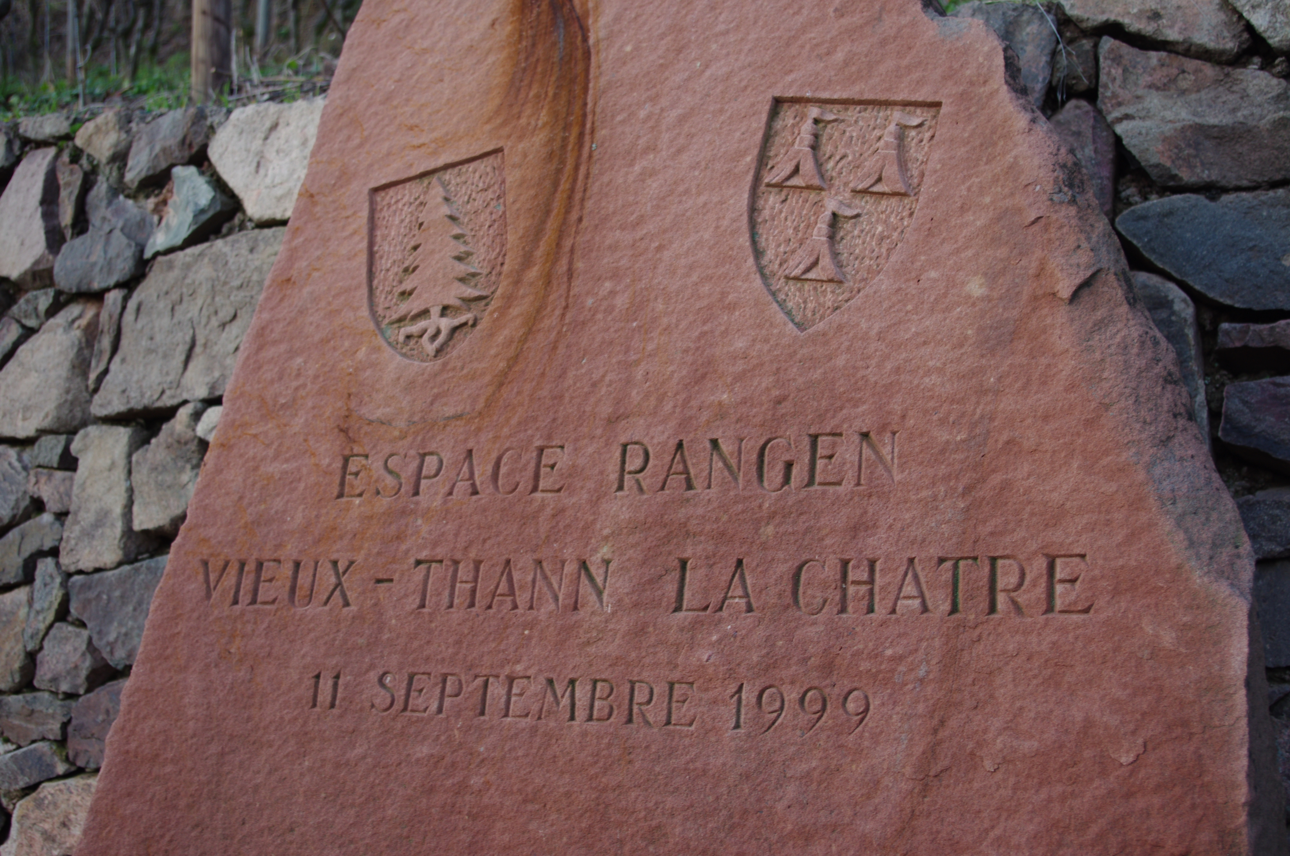 Stèle Espace Rangen Vieux-Thann La Chatre 11 septembre 1999